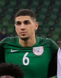 Nigeria national football team